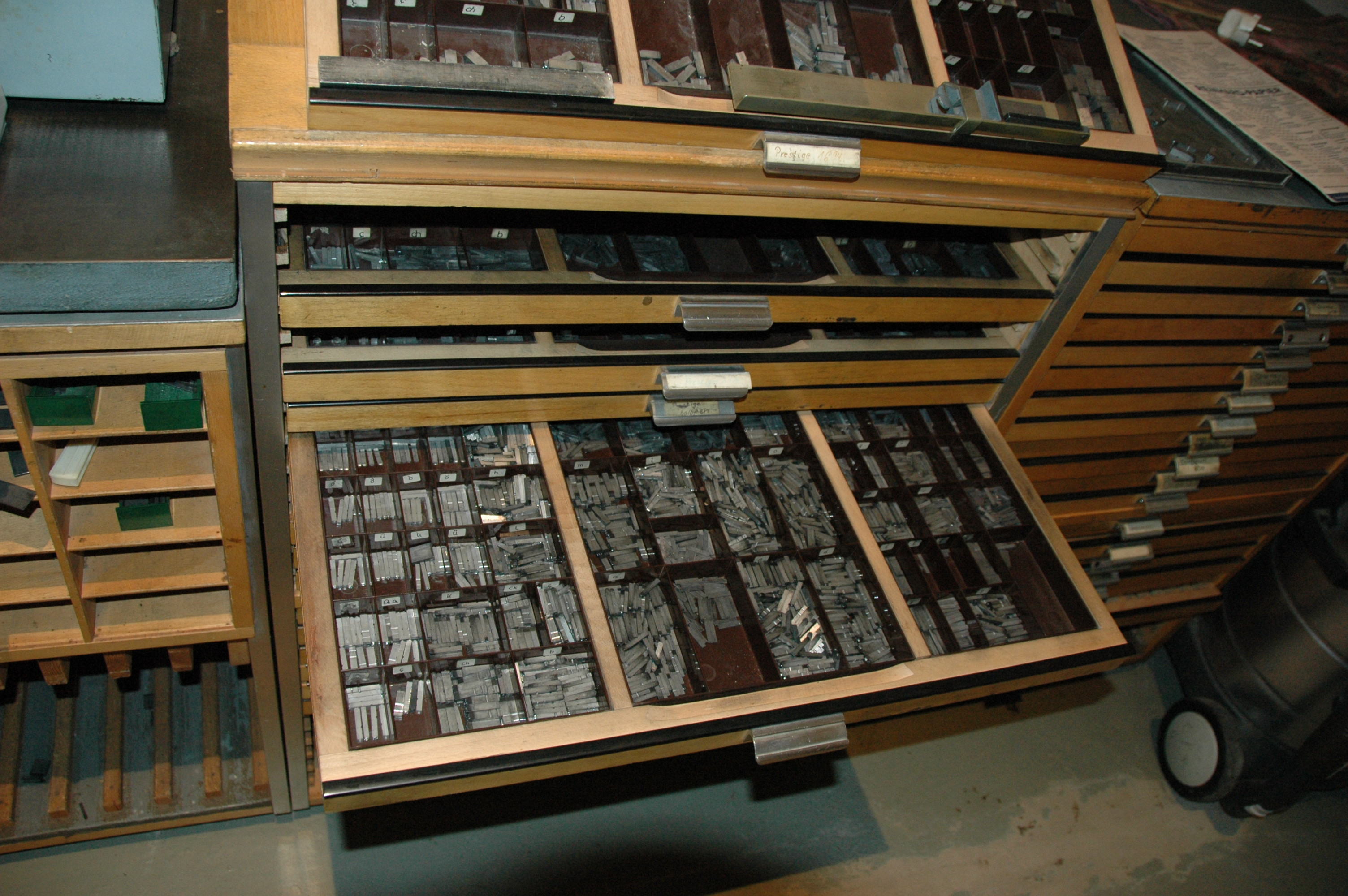 Letterkast, Maschinen- und Heimatmuseum Eslohe